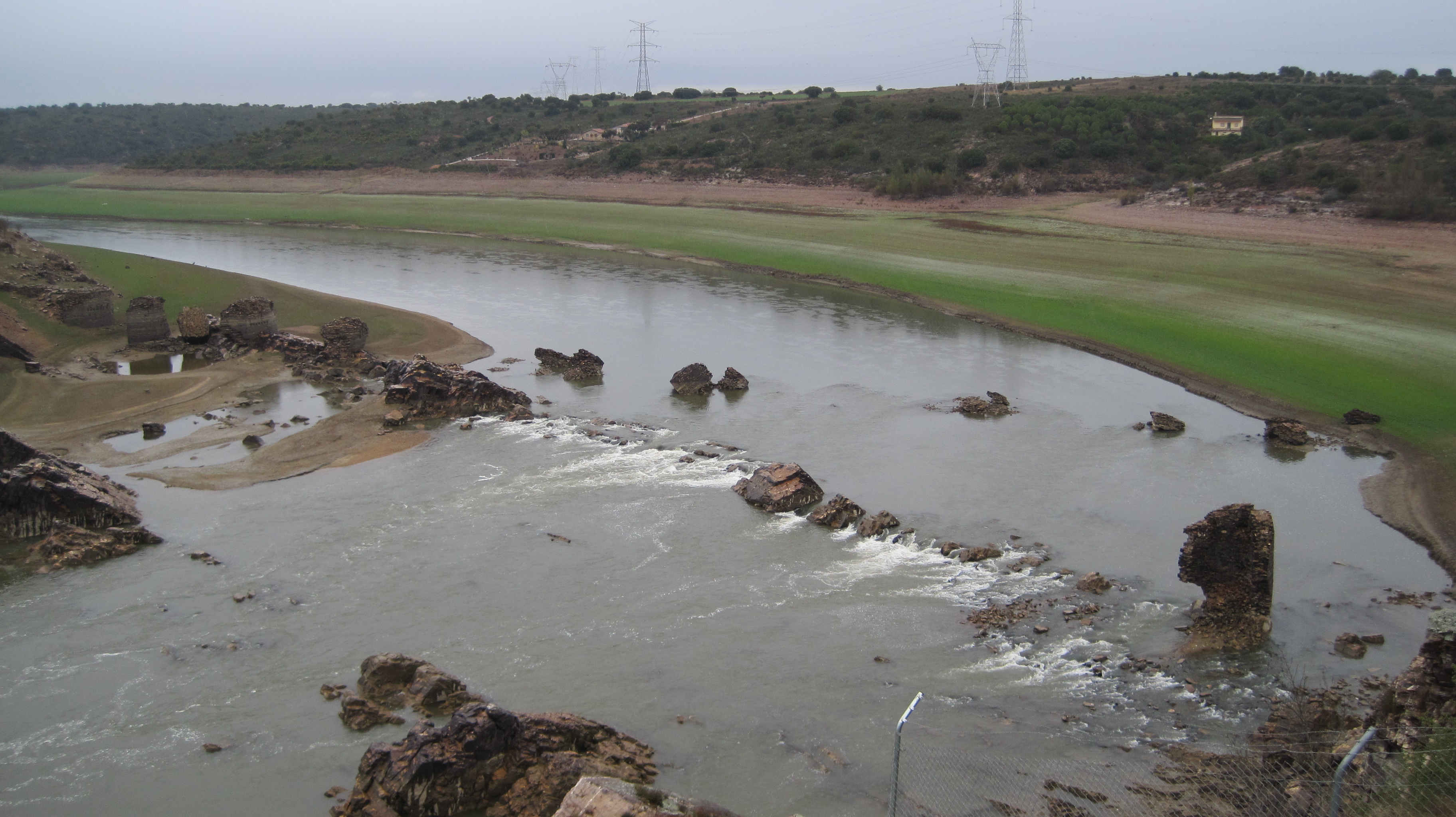 Vista de las ruinas del puente de Castrotorafe, Zamora.